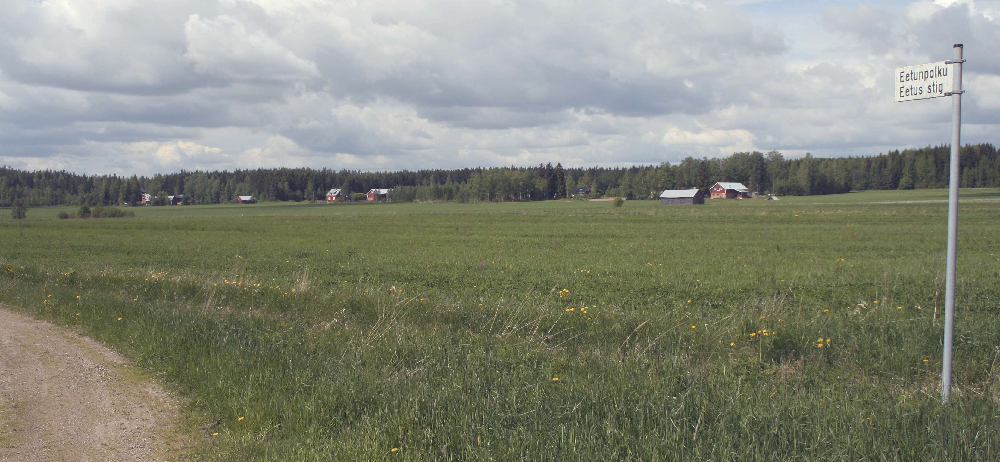 Kylmänsuon pohjoisosa Eetunpolulta.